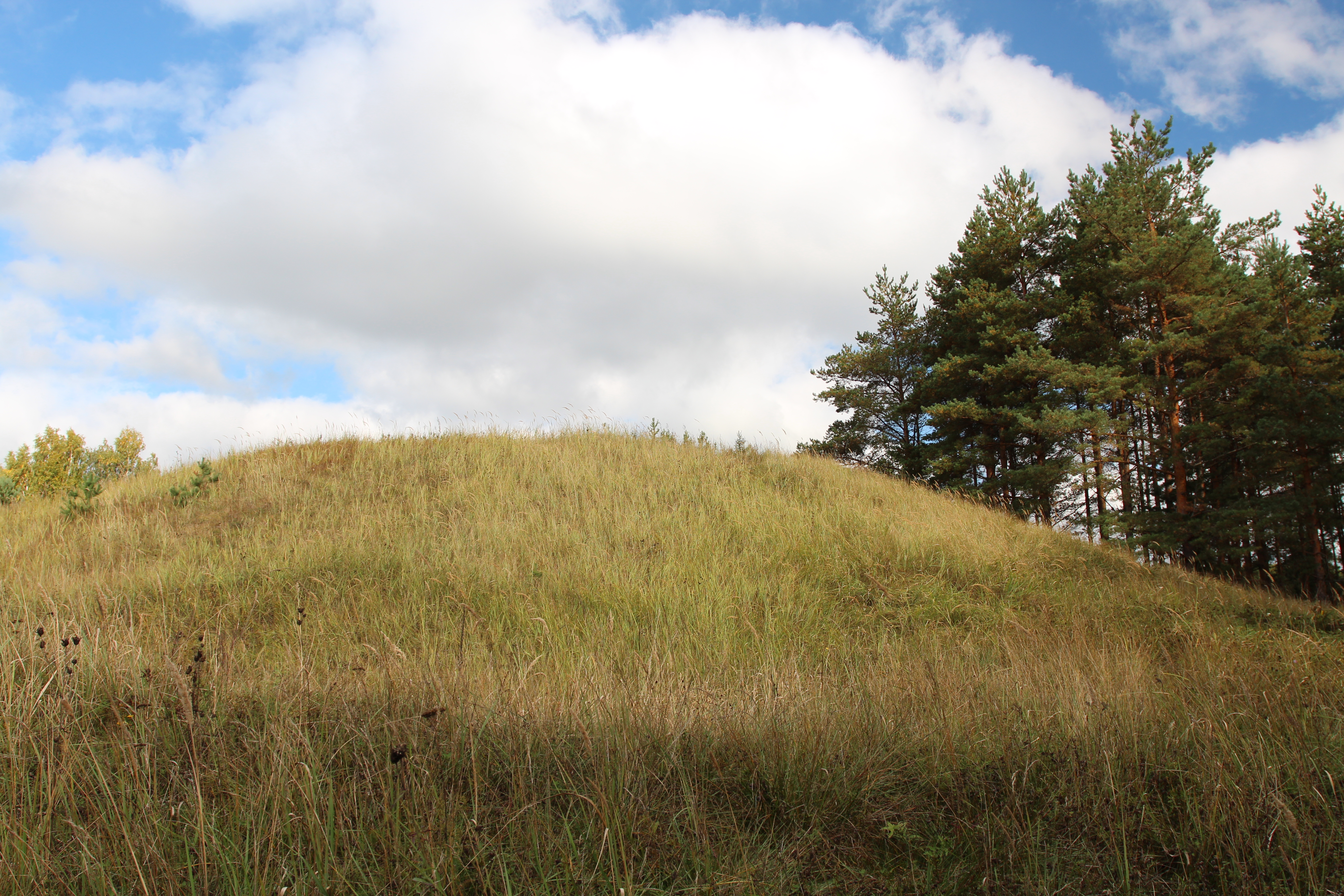 Tartu vald, Salu küla